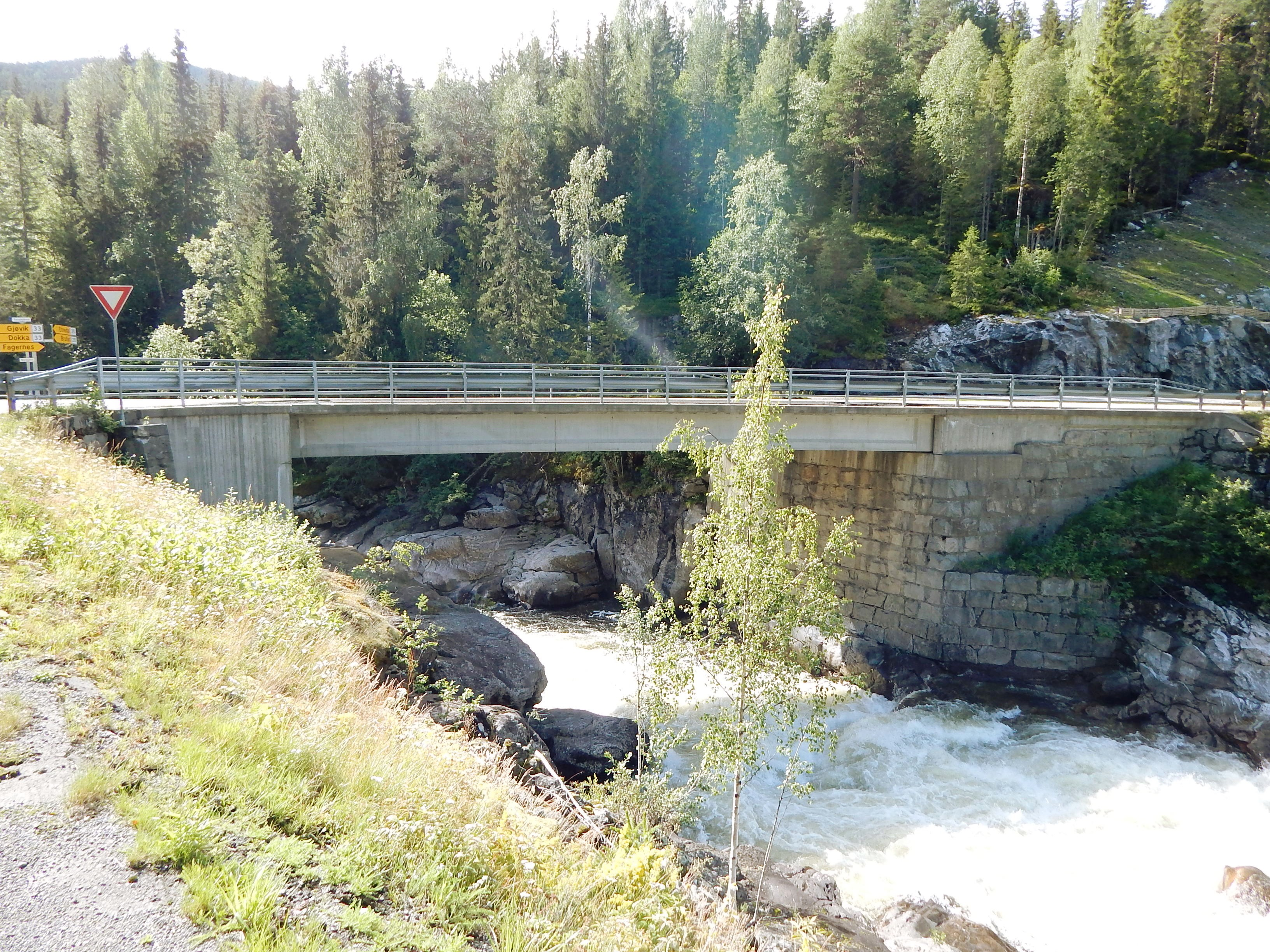 Høljerast bru